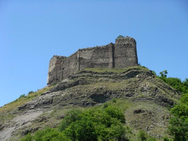 მძოვრეთის ციხე